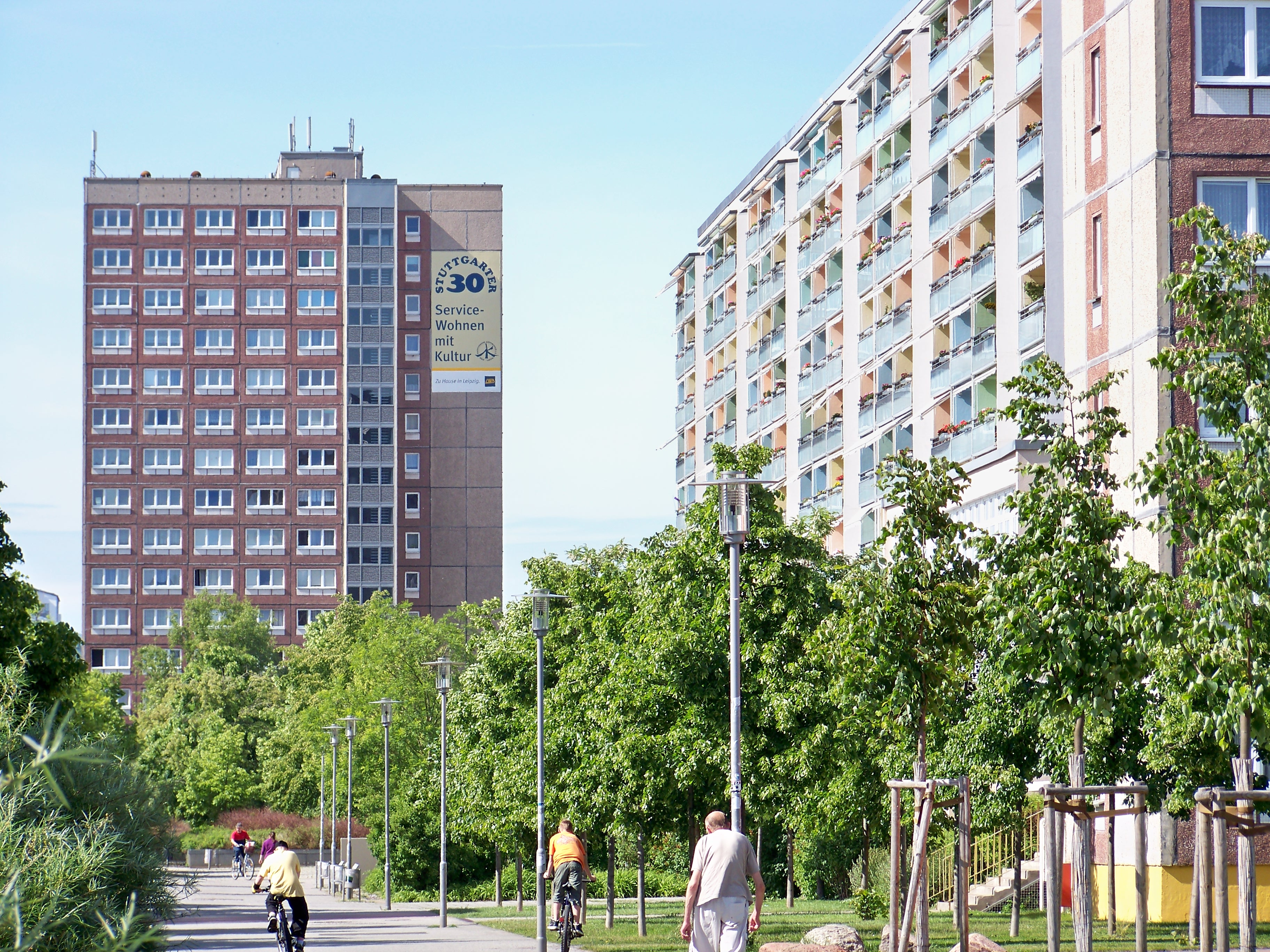 Plattenbauhochhäuser in Leipzig-Grünau Mitte